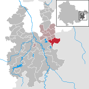 Seelingstädt in Thuringia - District Greiz